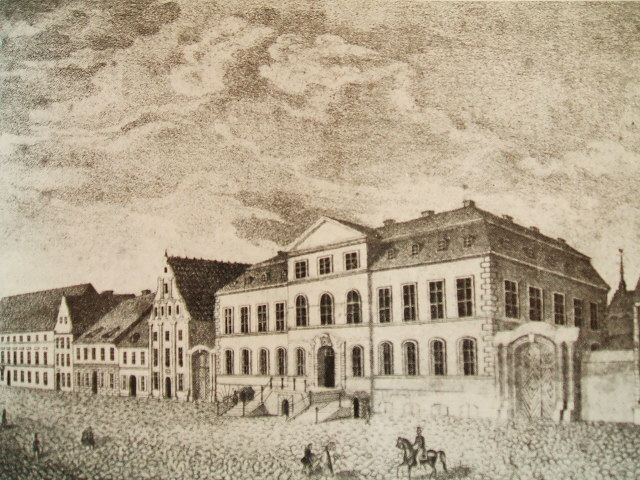 Das Bild zeigt eine Lithographie eines unbekannten Künstlers (21,2x14,1cm). Dargestellet ist das Meyerfeldtsche Palais, auch Schwedisches Regierungspalais. Dieses Foto wurde aus dem Buch "Geschichte der Stadt Stralsund" von Herbert Ewe, S. 225, abfotografiert.